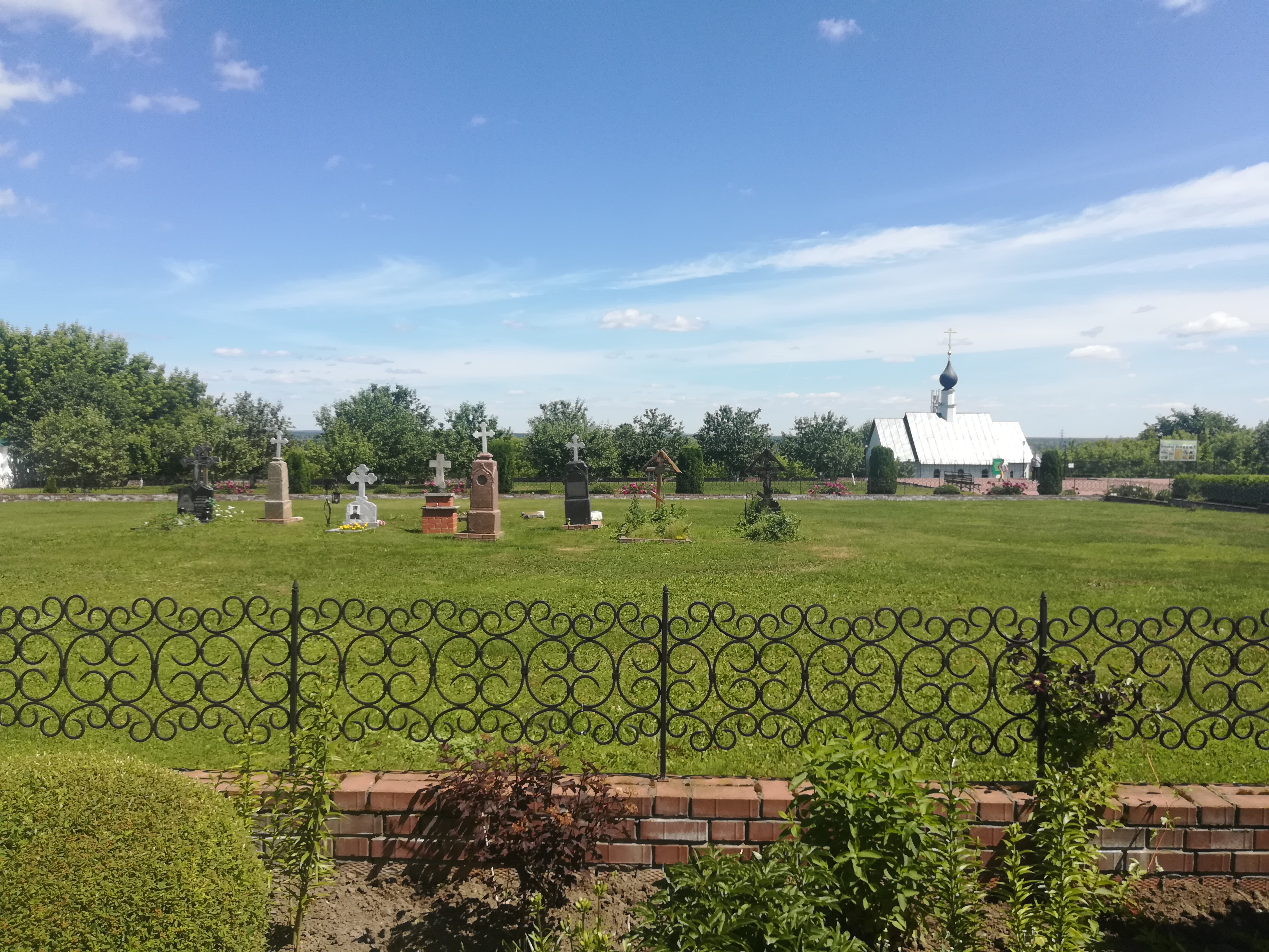 Муром